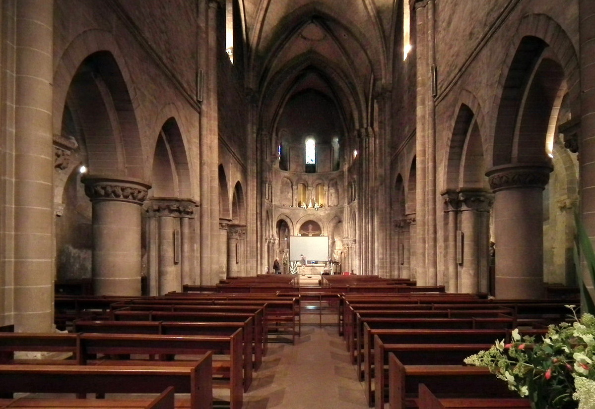 Basilique Notre-Dame d'Avesnières, Laval, France